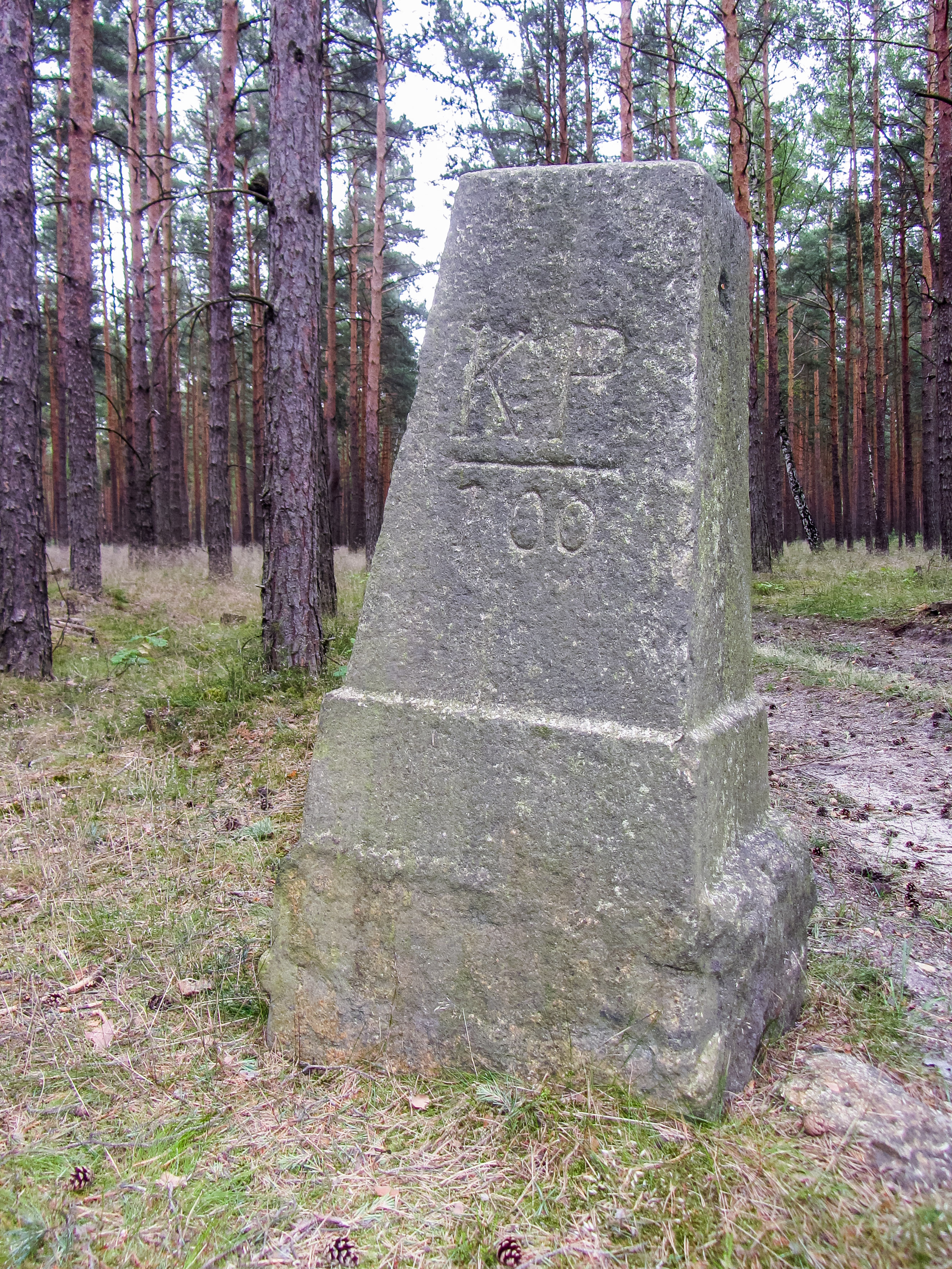 Grenzstein Nr. 100 Historische Landesgrenze Königreich Sachsen Königreich Preußen 1815 (Wiener Kongress)